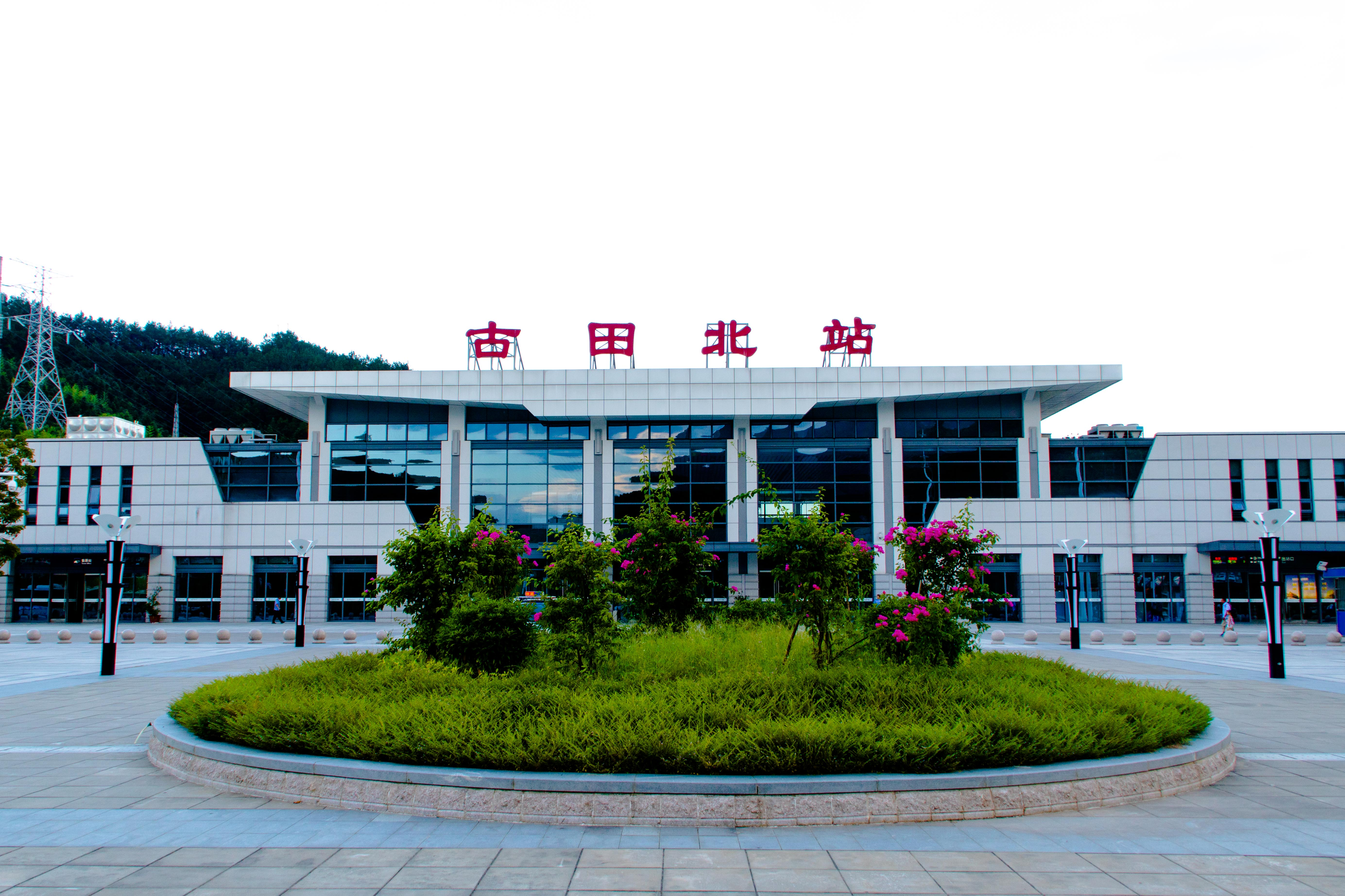 中文（中国大陆）: 古田北站站房